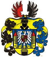 Znak města Bechyně